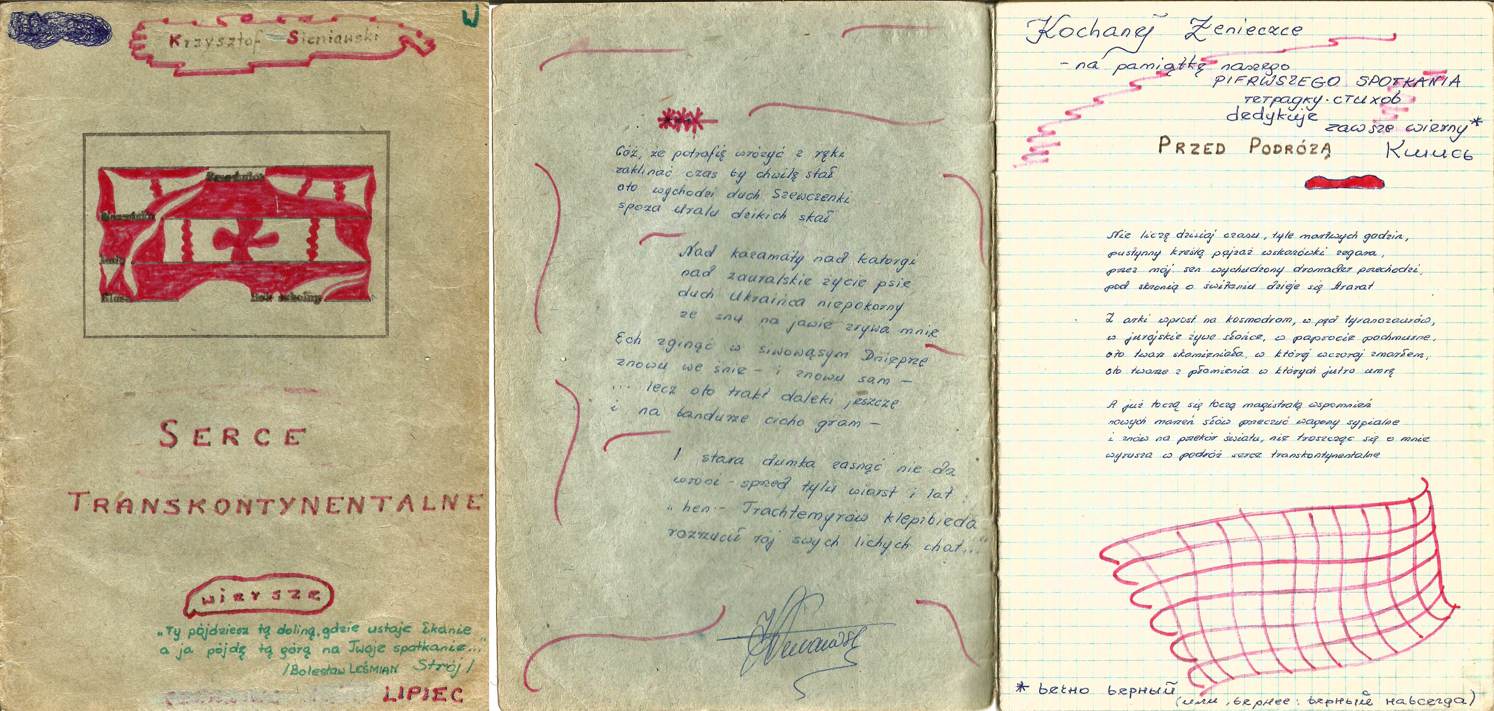 СЕРДЦЕ ТРАНСКОНТИНЕТ